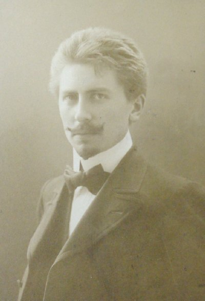 Portraitfoto des Künstlers Franz Boeres